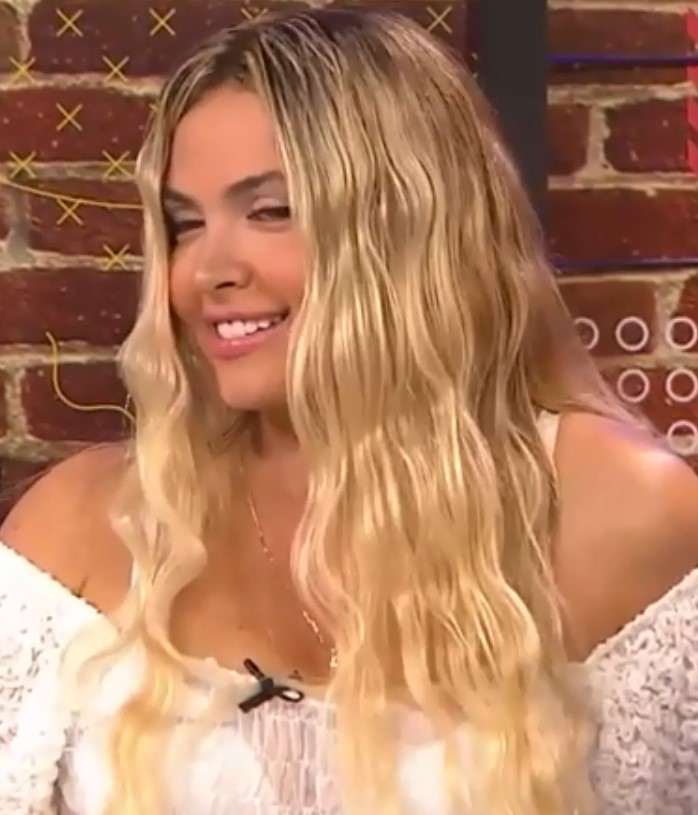 Jery Sandoval en entrevista para Telemedellín en 2020